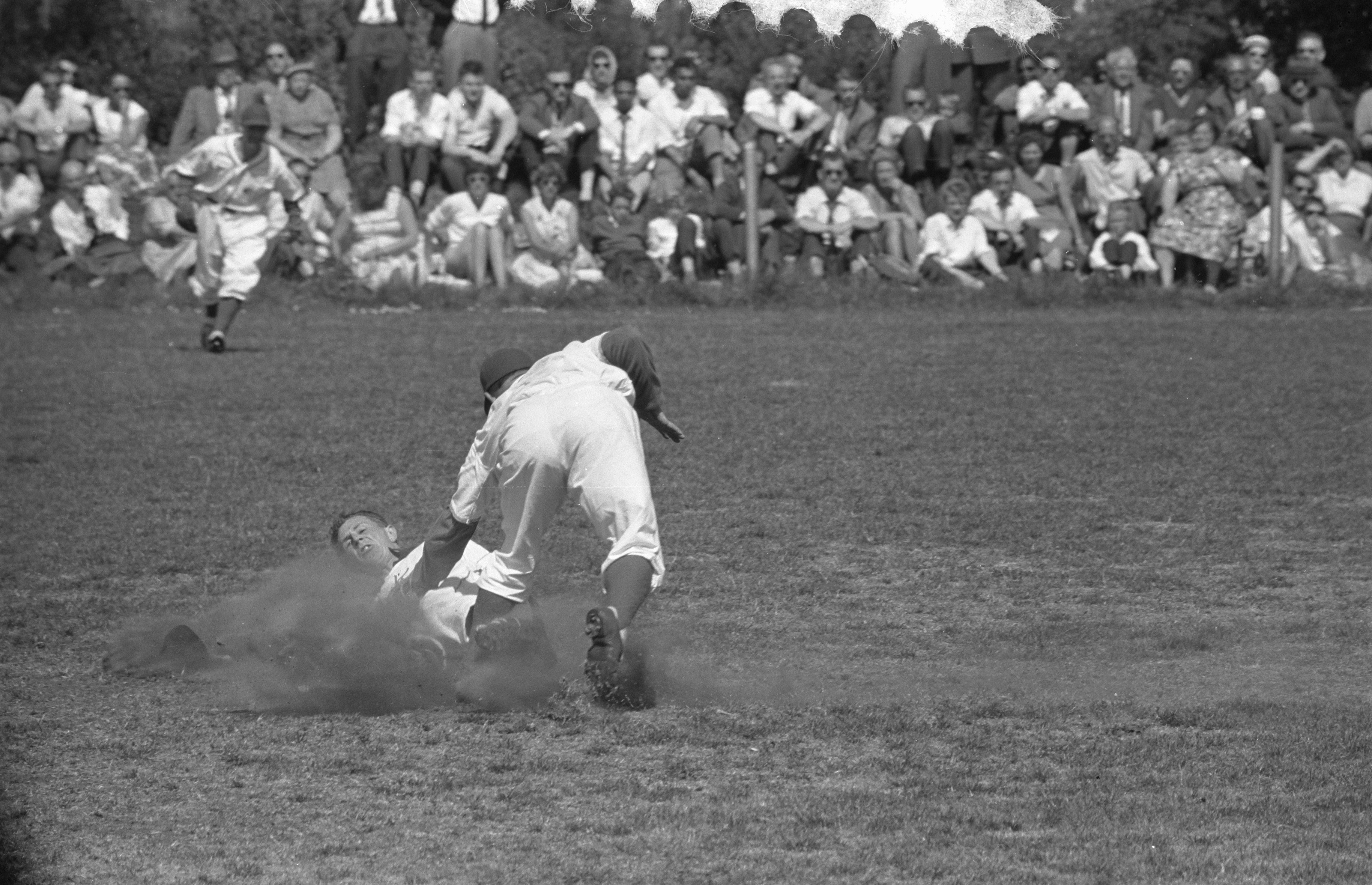 Collectie / Archief : Fotocollectie Anefo Reportage / Serie : [ onbekend ] Beschrijving : Honkbal OVVO tegen EHS, Rozekranz(OVVO), wordt uitgetikt op de tweede honk Datum : 14 juni 1959 Locatie : Amsterdam, Noord-Holland Trefwoorden : honkbal, sport Fotograaf : Pot, Harry / Anefo Auteursrechthebbende : Nationaal Archief Materiaalsoort : Negatief (zwart/wit) Nummer archiefinventaris : bekijk toegang 2.24.01.05 Bestanddeelnummer : 910-4438